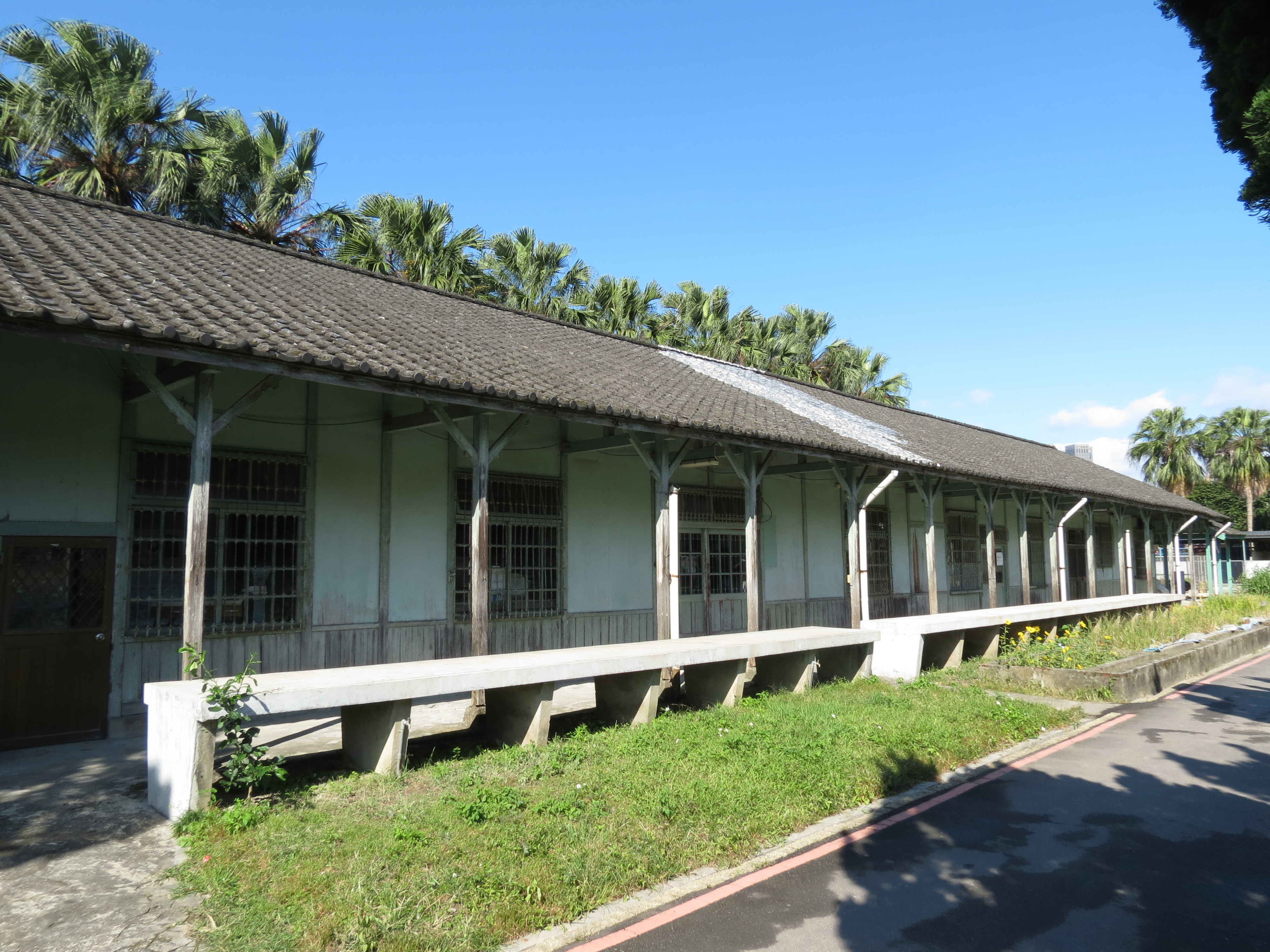 中文（台灣）: 台大磯小屋全景